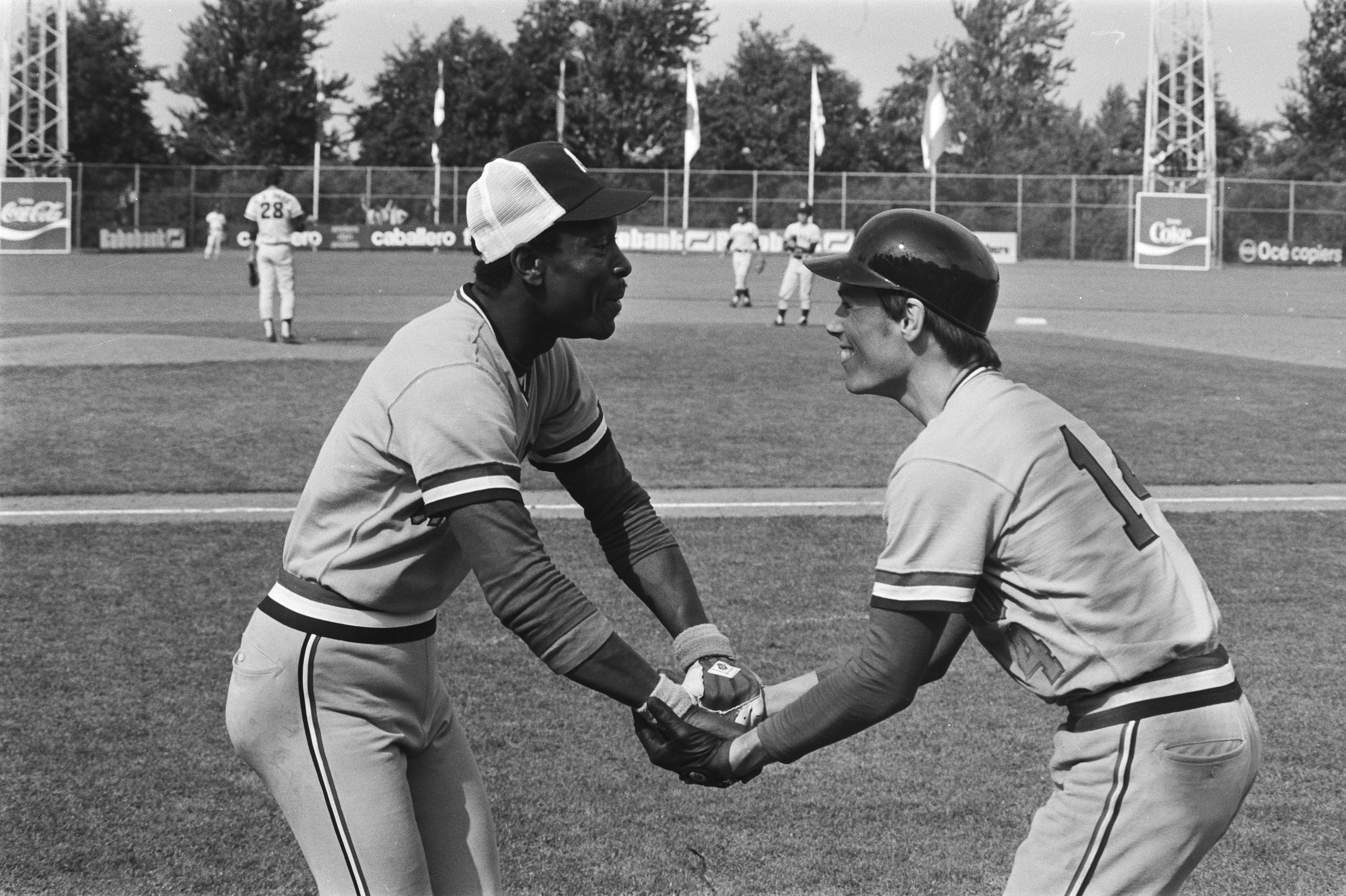 Collectie / Archief : Fotocollectie Anefo Reportage / Serie : [ onbekend ] Beschrijving : Haarlemse honkbalweek, Nederland tegen Korea; Ben Richardson (l) en Charles Urbanus feliciteren elkaar Datum : 13 augustus 1978 Locatie : Haarlem Trefwoorden : felicitaties, honkbal, sport Persoonsnaam : Richardson Ben, Urbanus, Charles Fotograaf : Verhoeff, Bert / Anefo Auteursrechthebbende : Nationaal Archief Materiaalsoort : Negatief (zwart/wit) Nummer archiefinventaris : bekijk toegang 2.24.01.05 Bestanddeelnummer : 929-8555